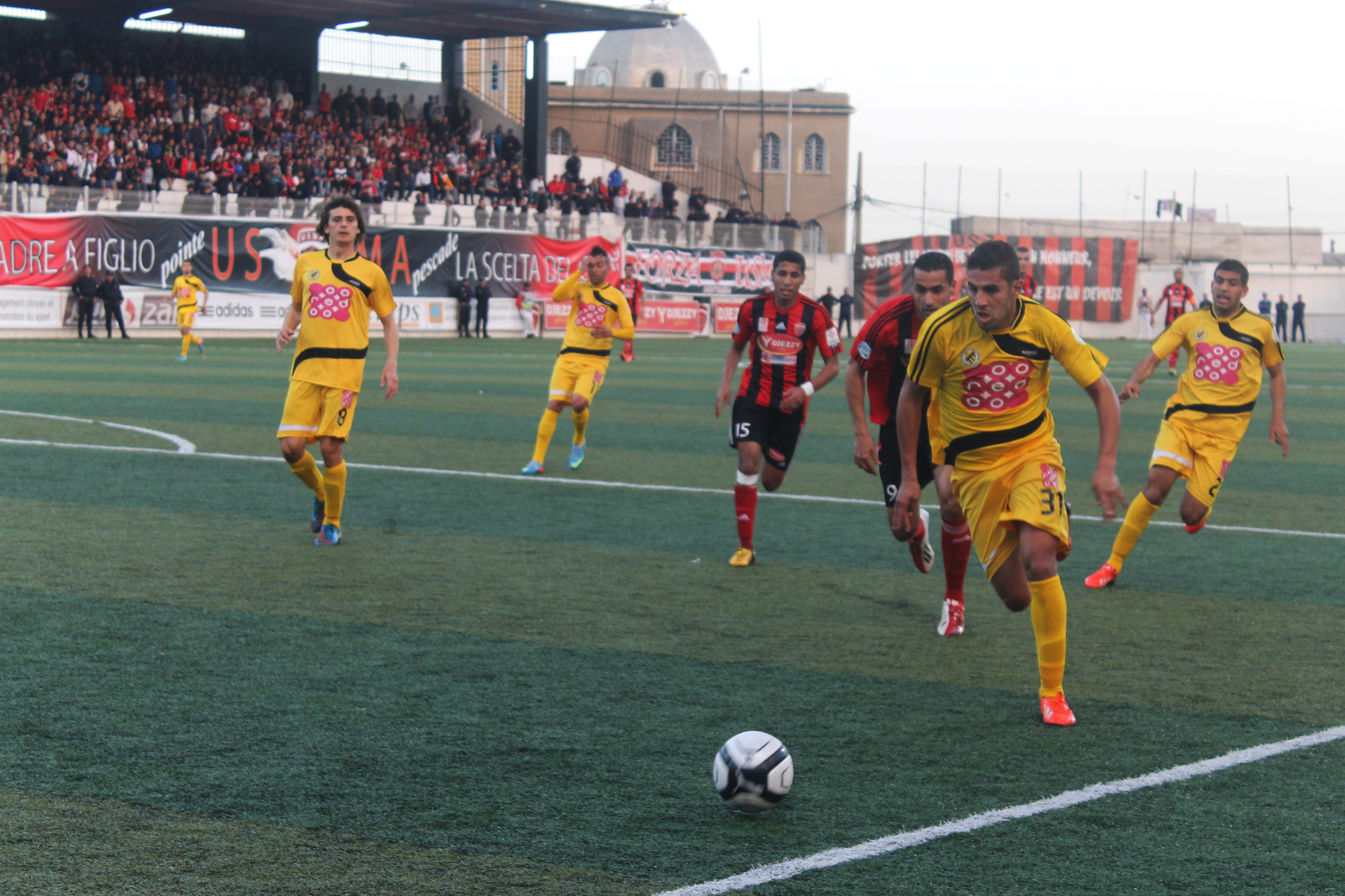 Action de jeu durant le match de Ligue 1 opposant l'USM Alger à l'USM El Harrach au stade Omar-Hamadi, le 15 février 2014.